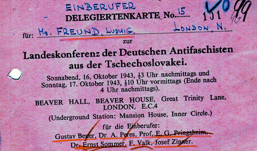 Doklady pocházející z doby exilové činnosti Ludvíka Frejky v letech 2. světové války ve velké Britanii. Delegačenka na zemské konferenci německých antifašistů (Zdroj: ABS)